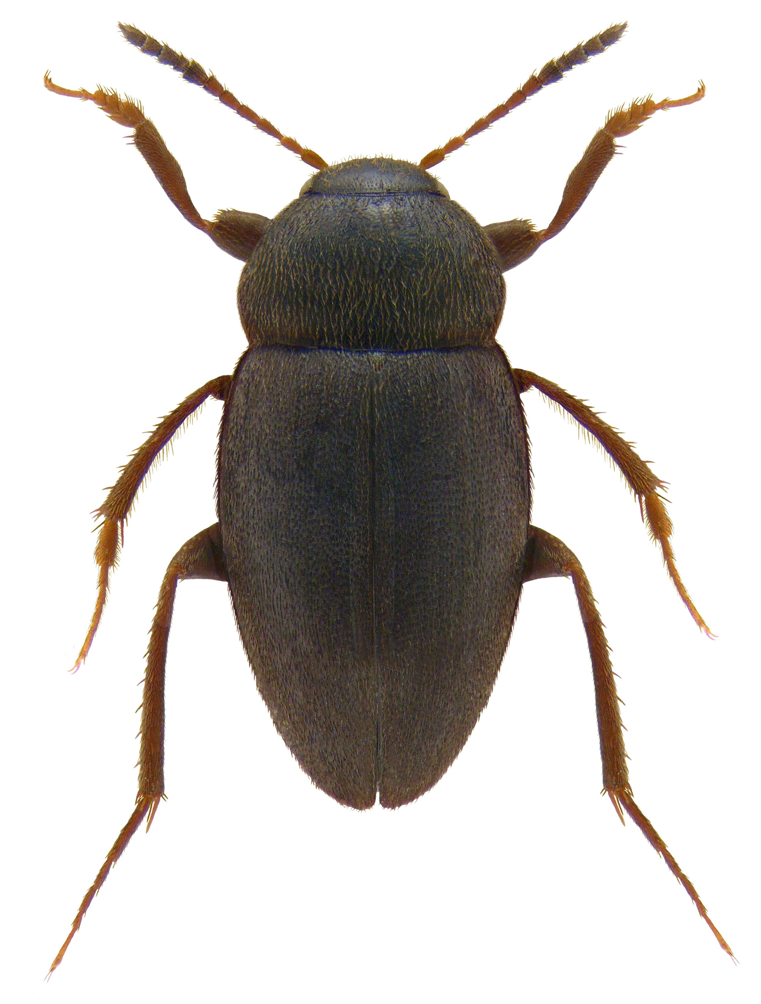 Familie: Cholevidae Groesse: 3,0-4,5 mm Verbreitung: Europa Oekologie: in Säugetierbauten, an Kadavern, an Pilzen Fundort: Germania, Oberbayern, Garmisch leg.det. U.Schmidt, 1982 Photo: U.Schmidt, 2009